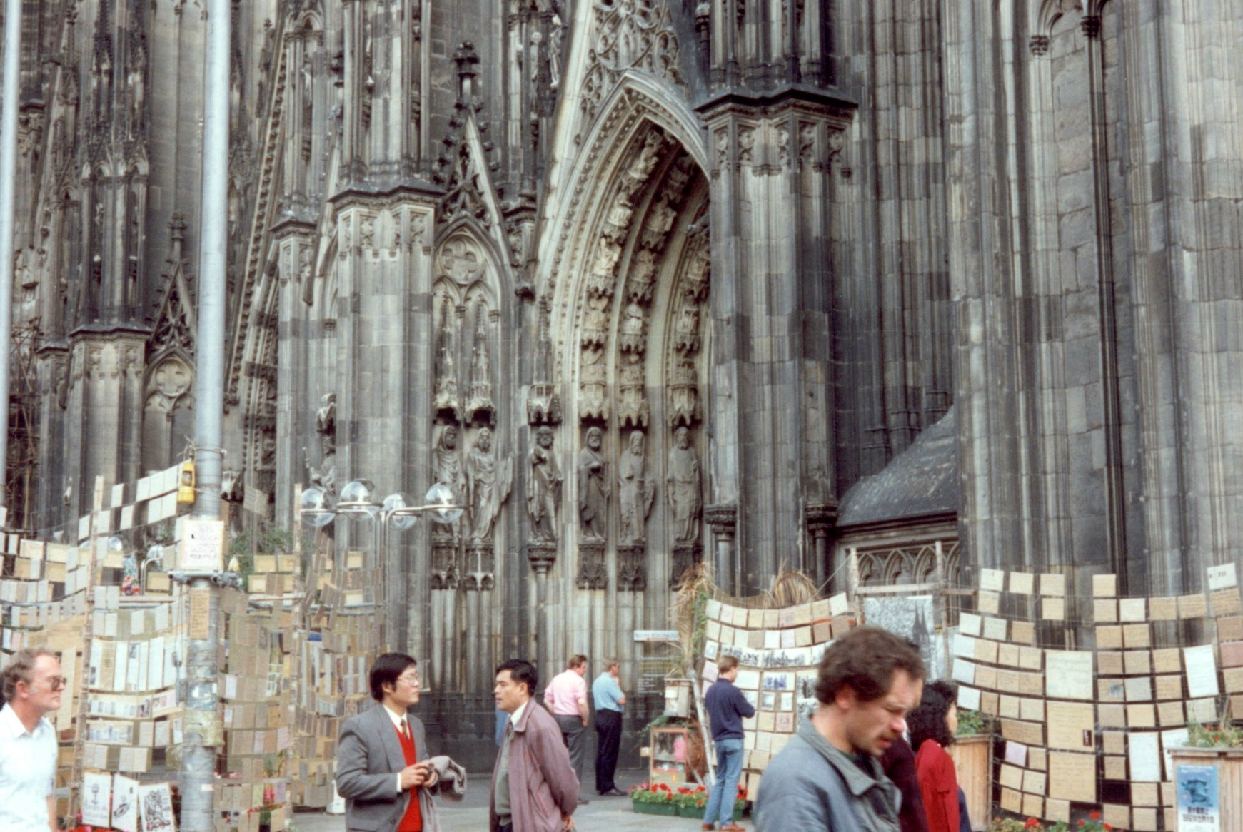 Köln, so genannte "Klagemauer"